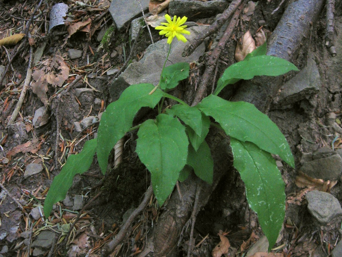 Hieracium racemosum Waldst. & Kit. ex Willd. subsp. virgaurea (Coss.) Zahn